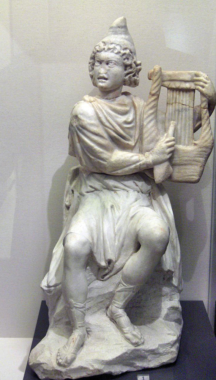 Marble statue of Orpheus; mid 3rd century. Museo della città di Rimini.